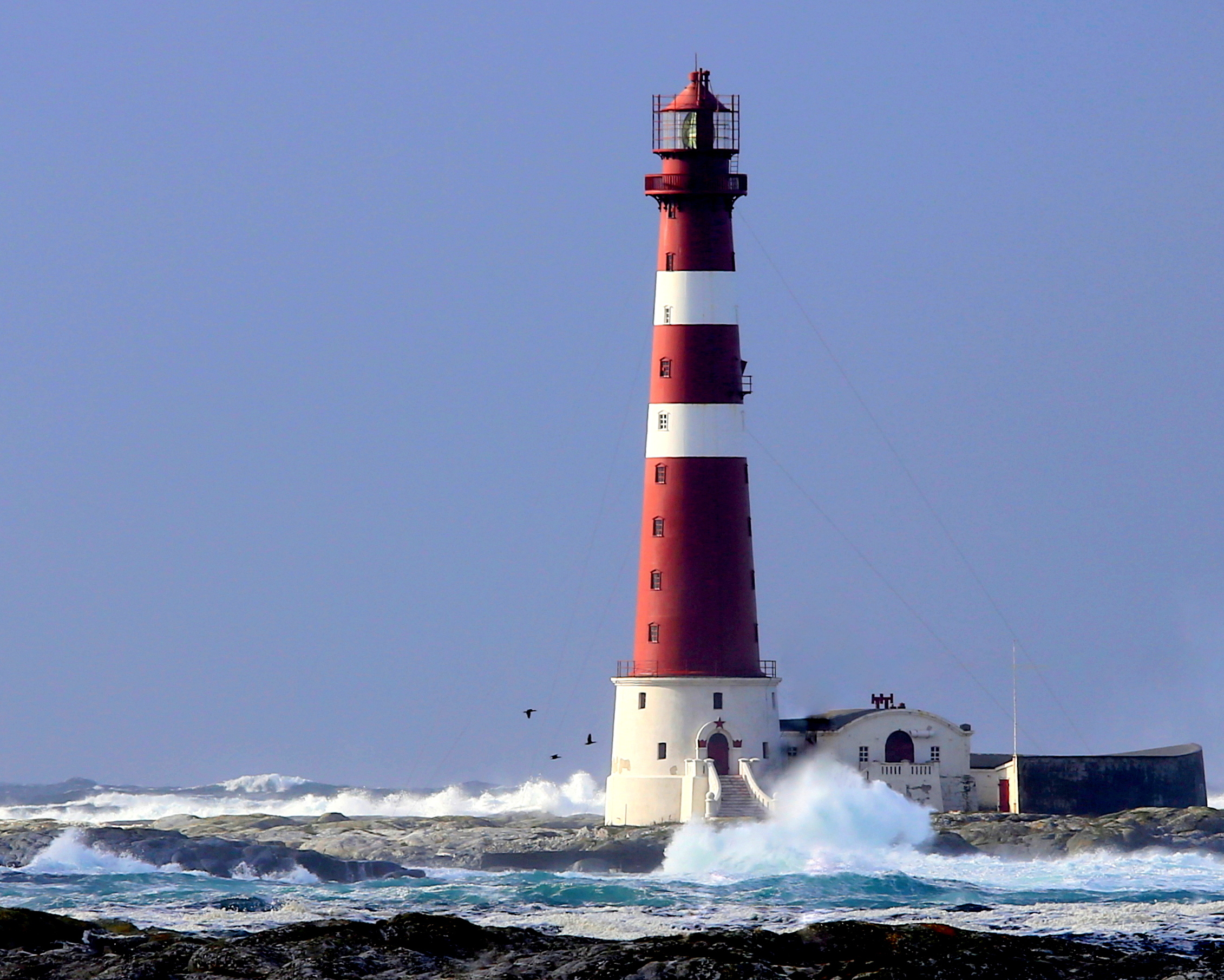 Sletringen Fyrstasjon Titran Frøya Norway